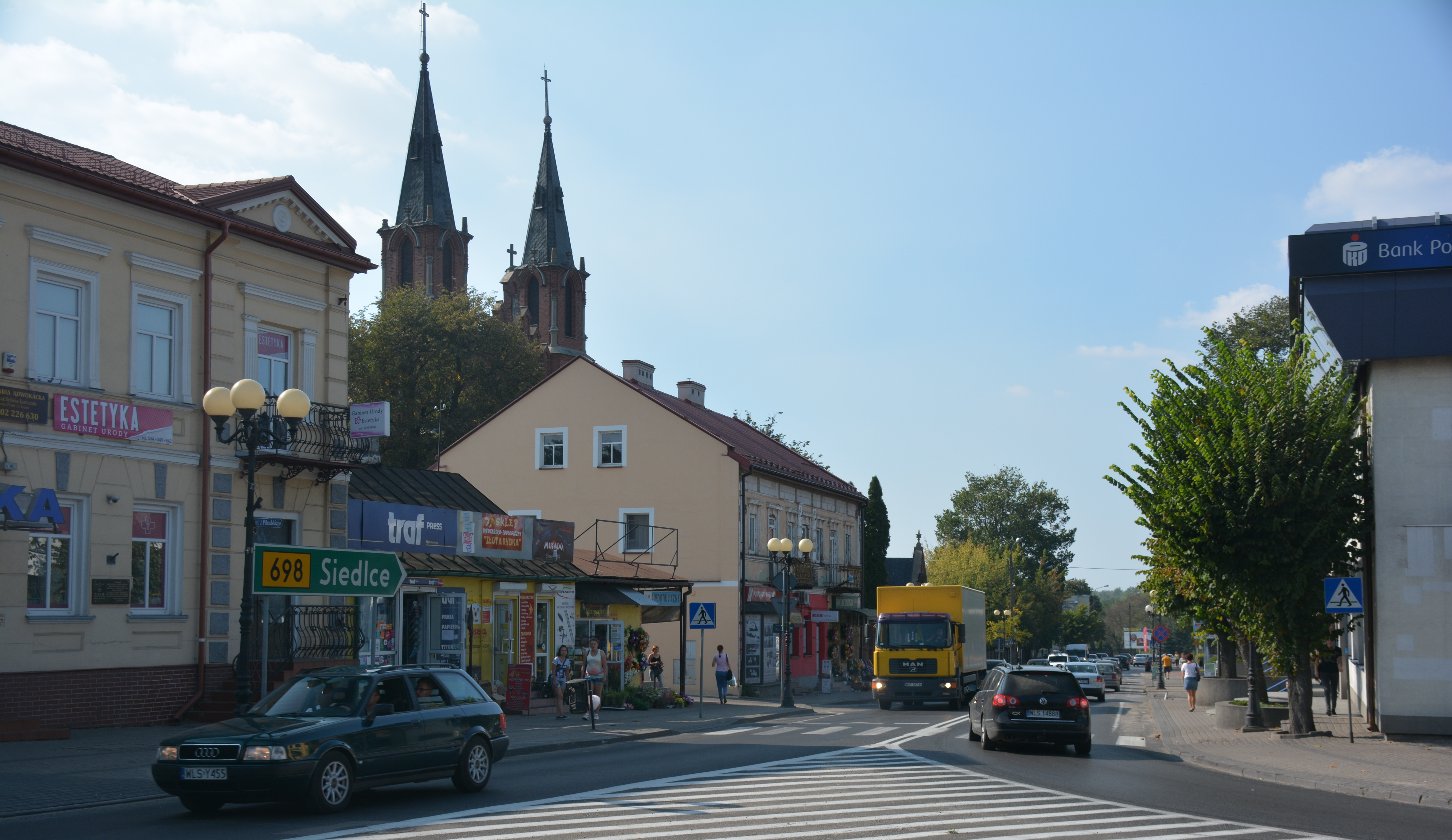 Łosice, Poland